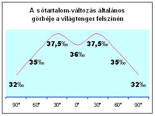 A sótartalom-változás általános görbéje a világtenger felszínén. Elméleti adatok, a valóságban ettől eltér!